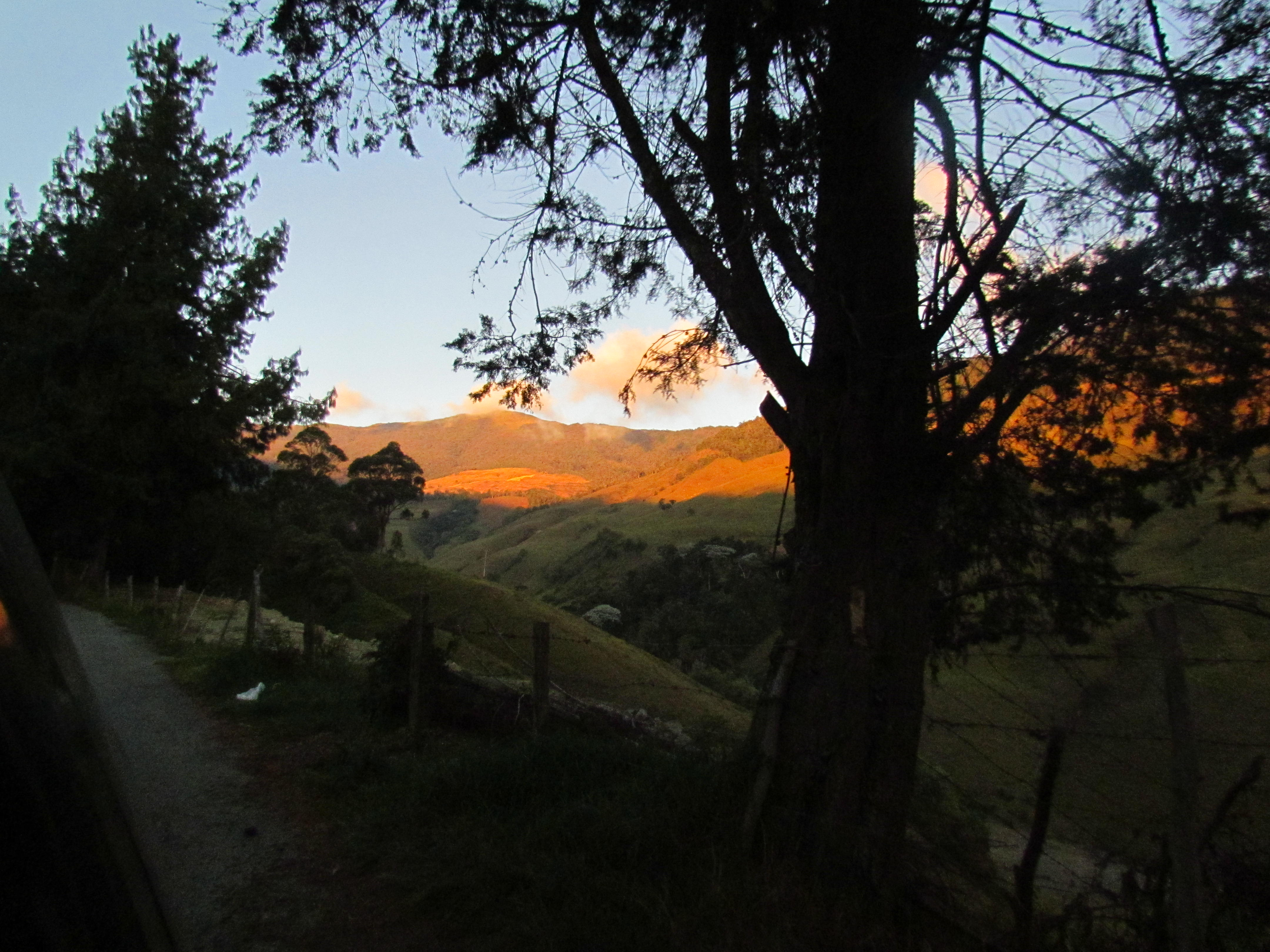 Atardecer despejado en el Páramo vía Canagua - el Molino edo Mérida